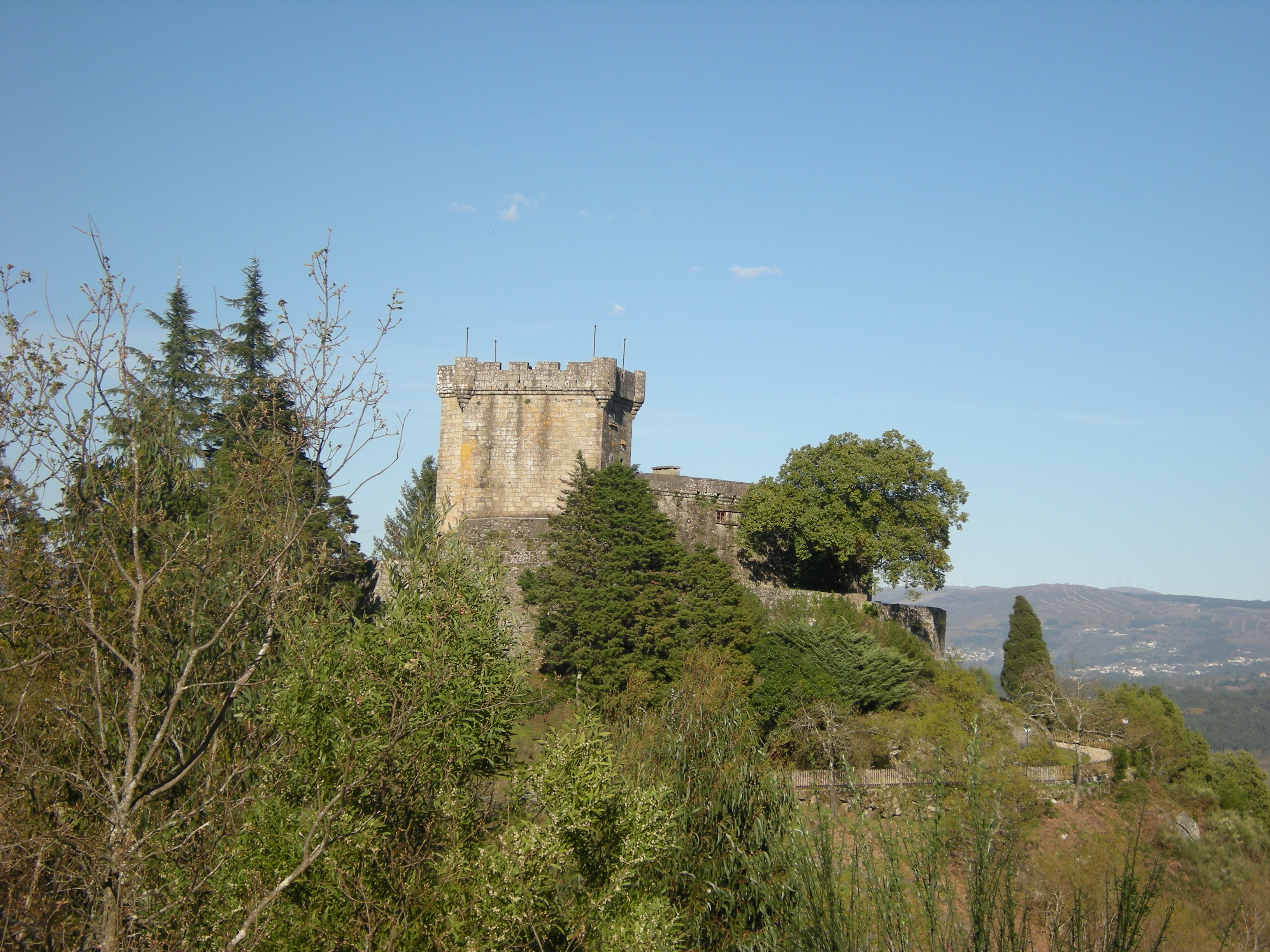 Esta foto participó en el juego En otro lugar de Flickr.